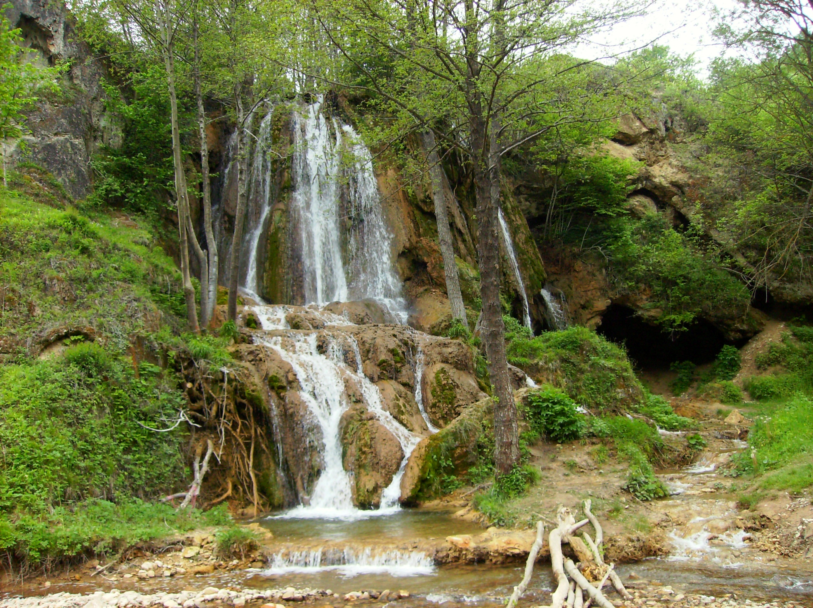 Српски (ћирилица): Бигарски водопад